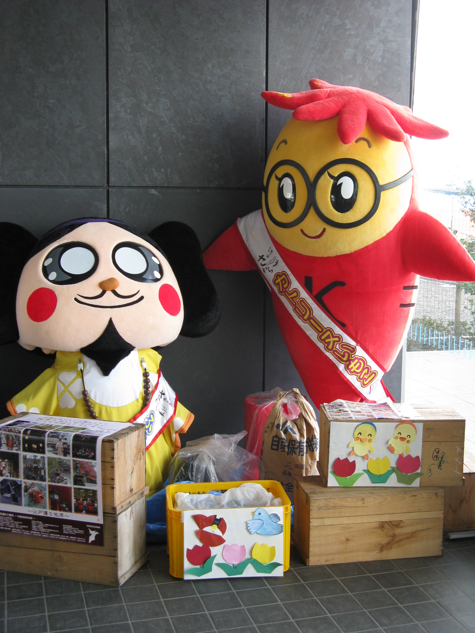 水の郷さわらのキャラクター、「ふつぬしさま」と「カトリーヌ・いもこ」